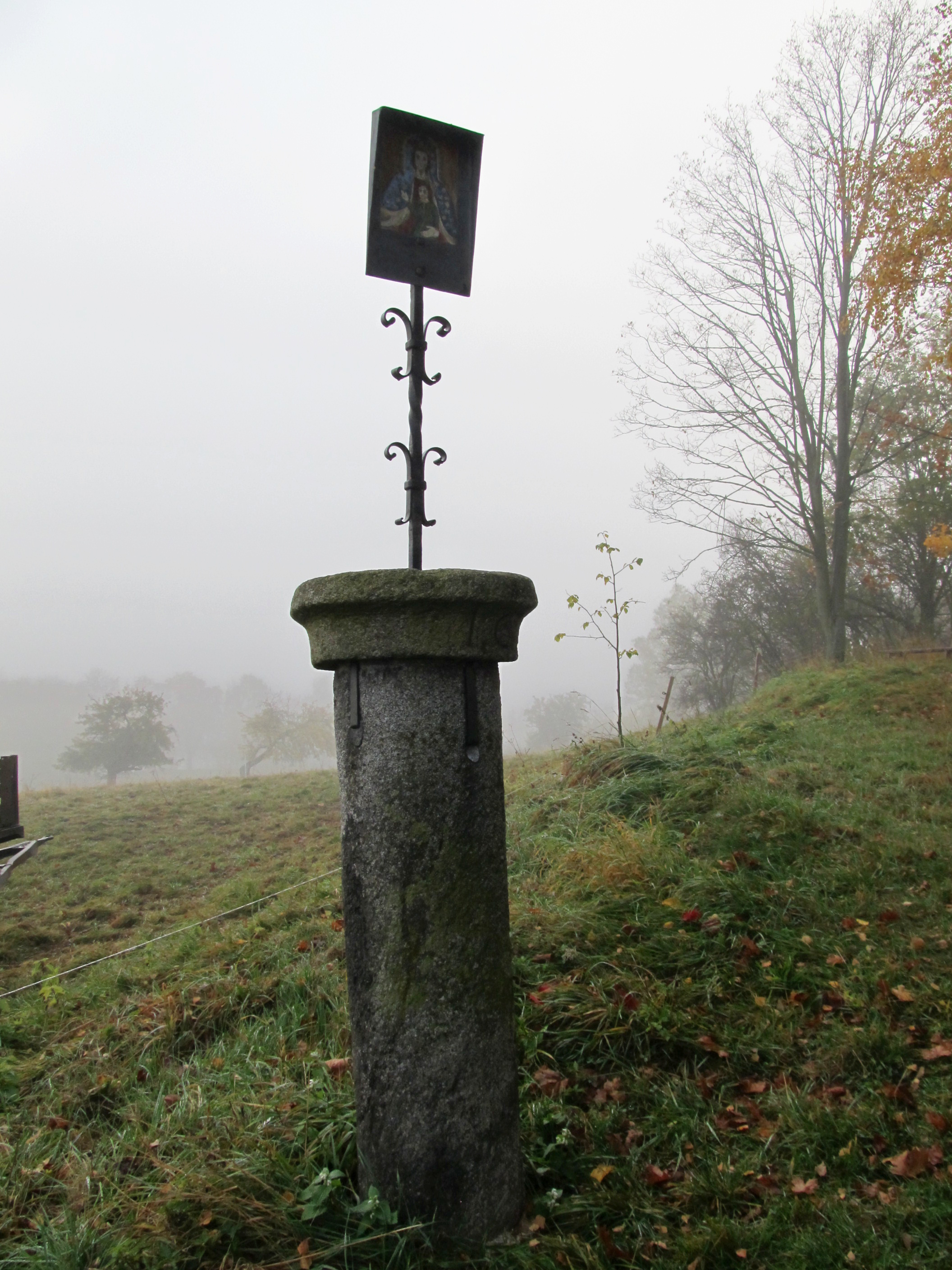 Kašperské Hory - pranýř pod Šibeničním vrchem